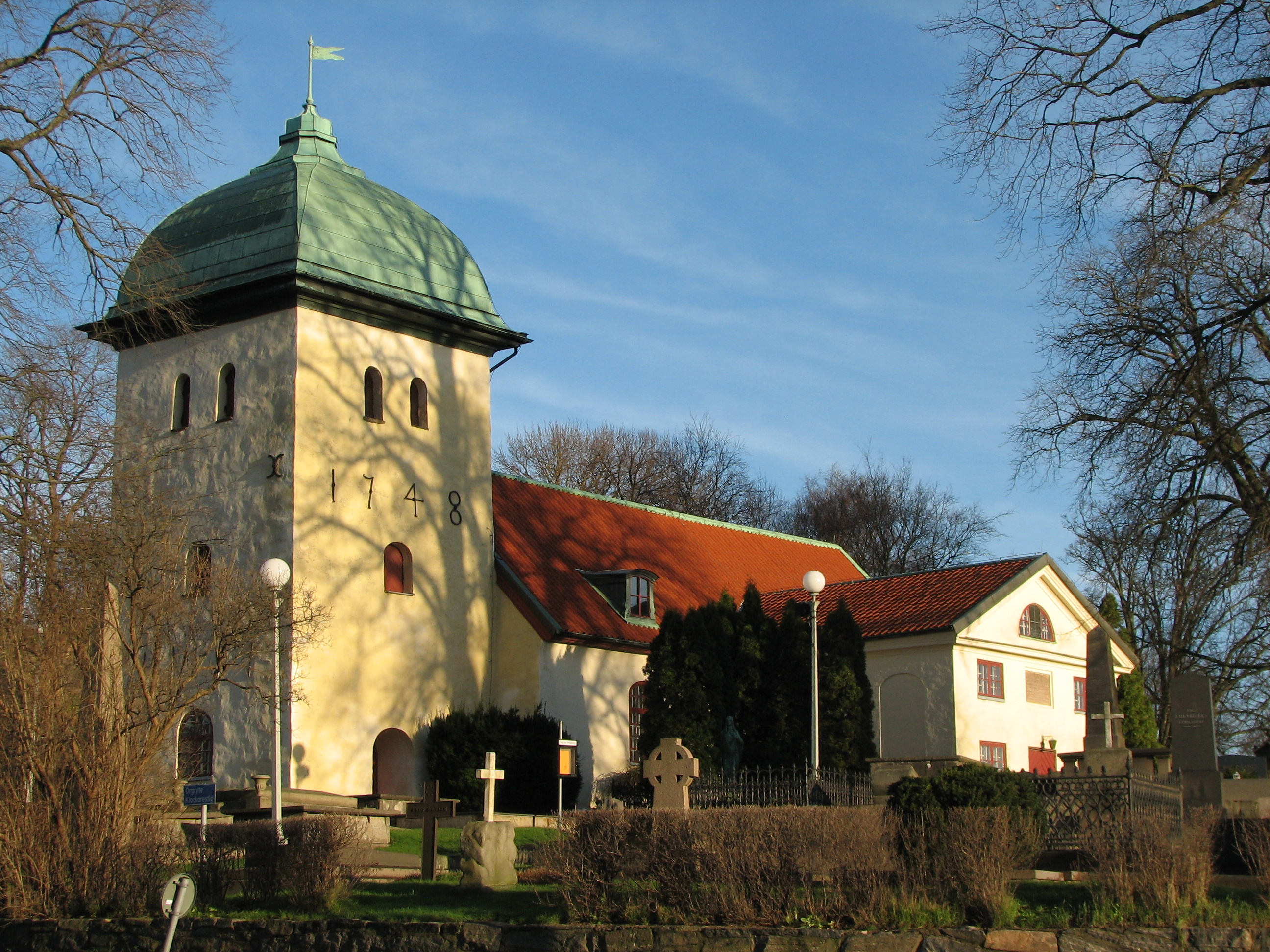 The church "Örgryte gamla kyrka" in Göteborg, Sweden, seen from SW.